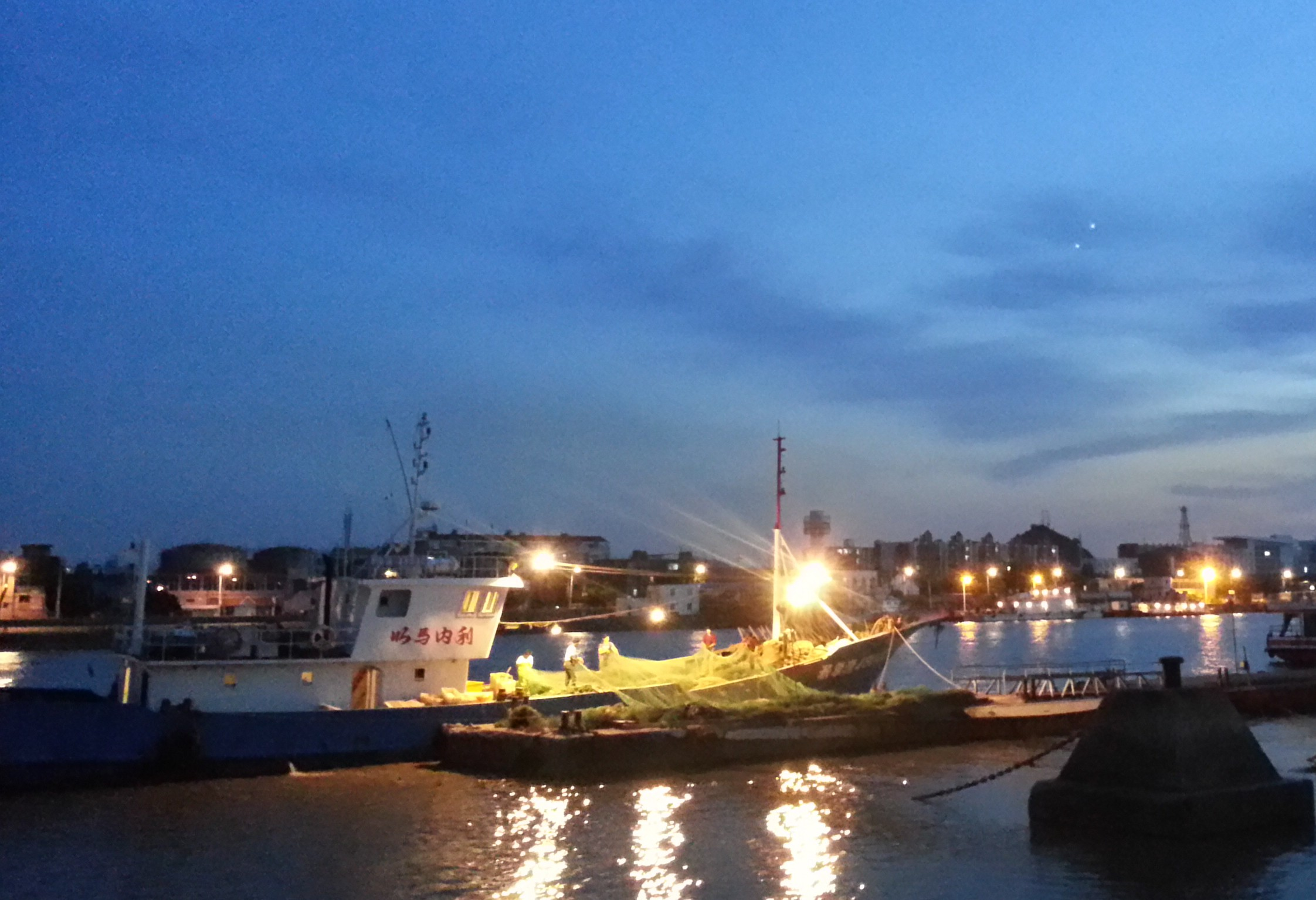 一艘在镇海卸货的渔船